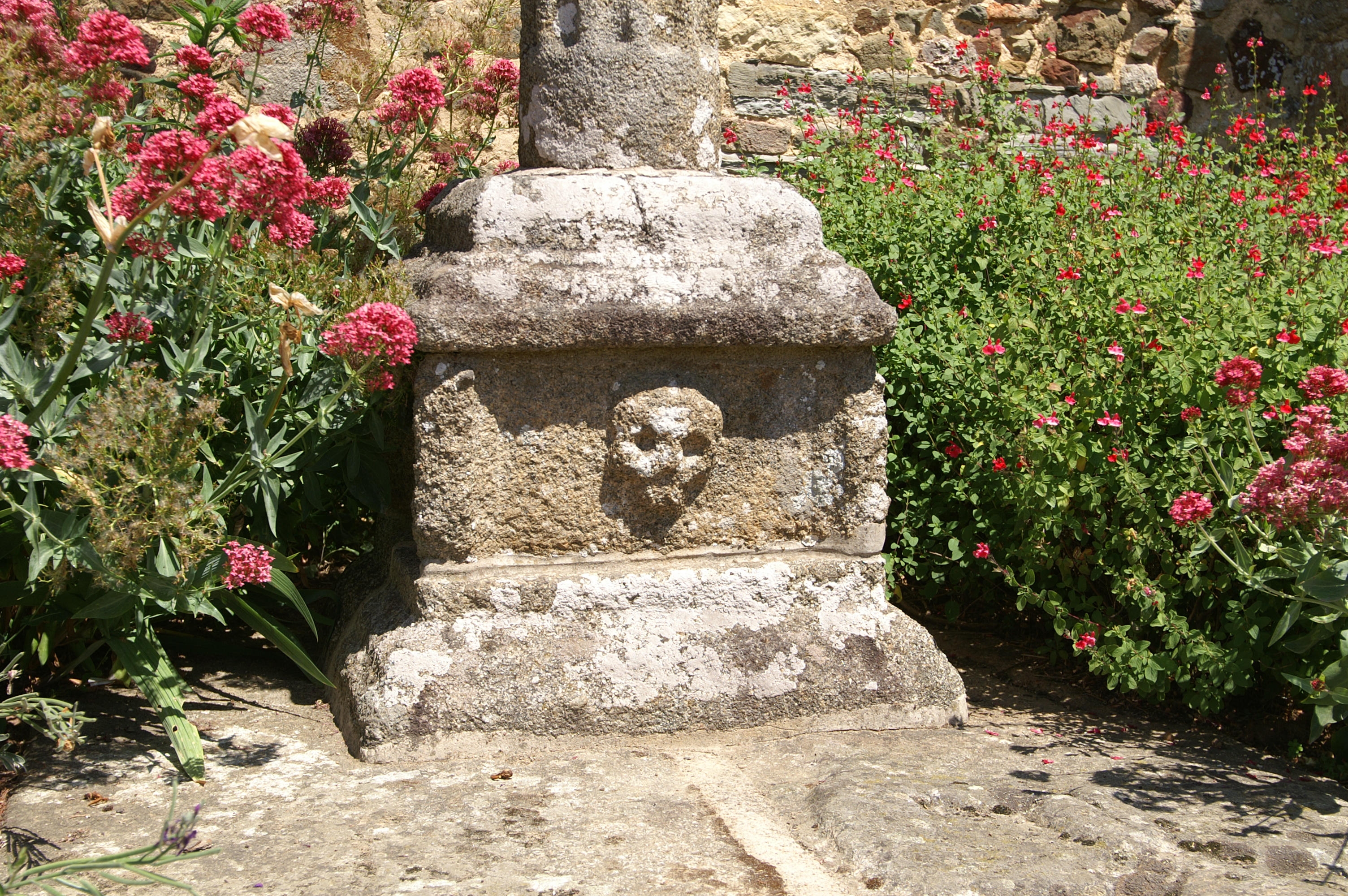 Croix de cimetière à Nouvoitou : base de la croix.